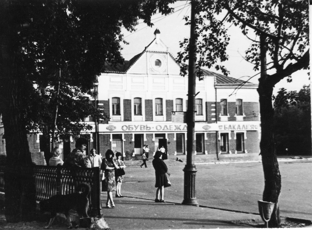 1975 г. Площадь Терёхина